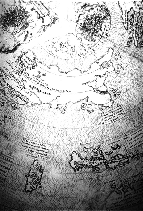 Фрагмент планисферы Контарини, изданной в 1506 году